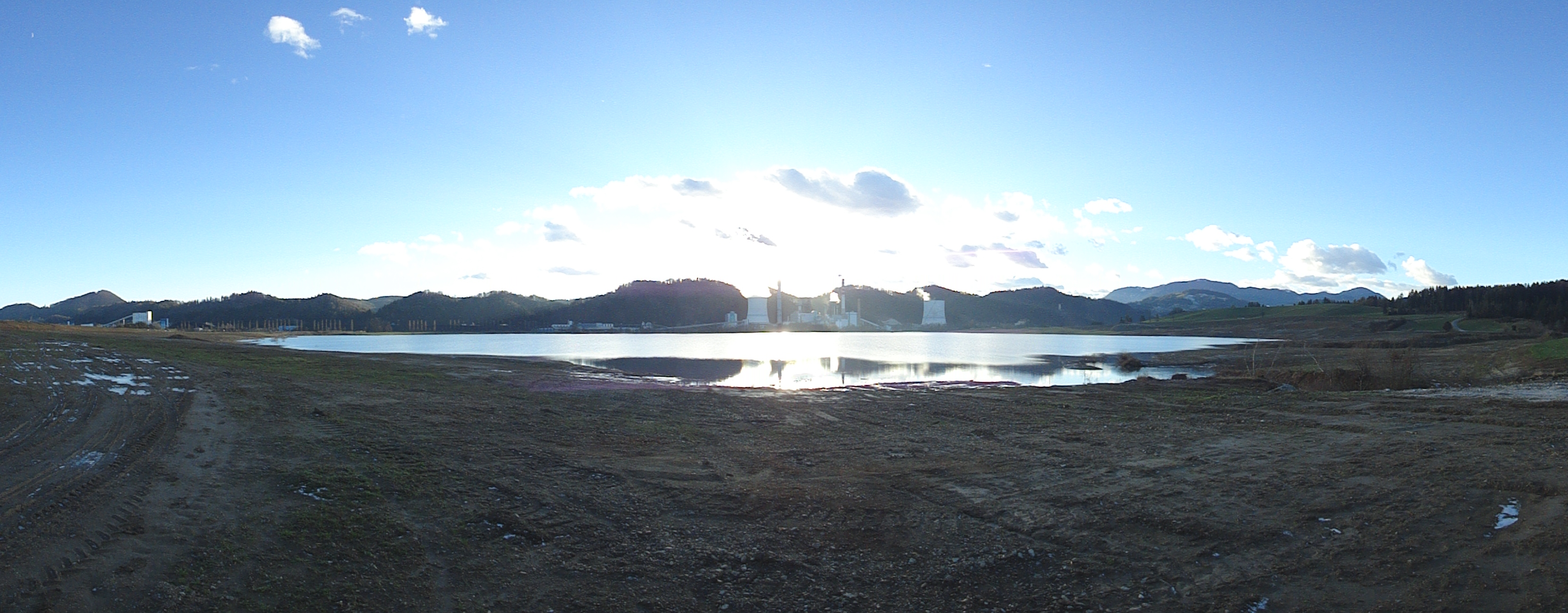 Pogled na Termo Elektrarno Šoštanj (TEŠ) preko Družmirskega jezera.